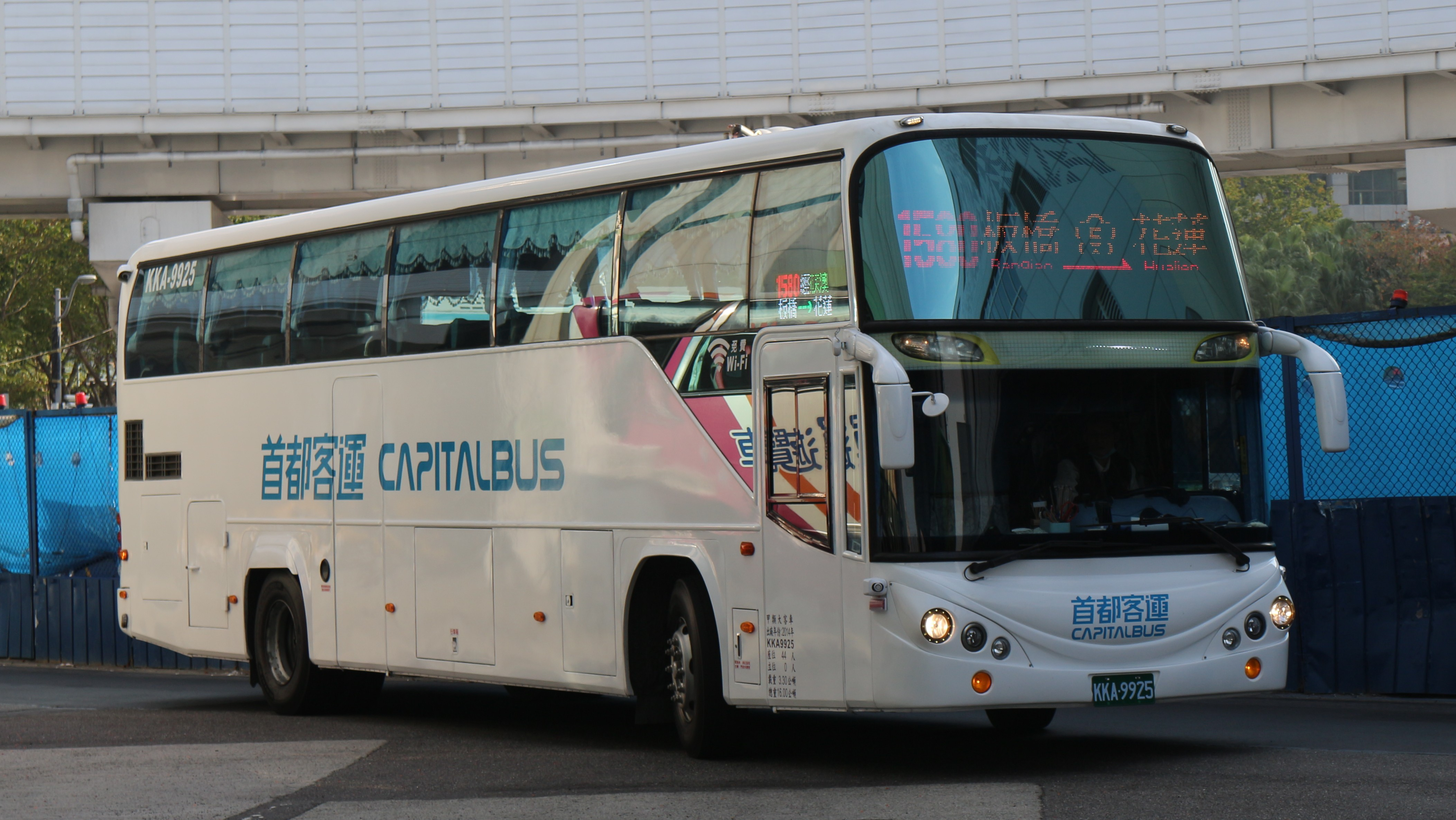 中文（台灣）: 首都客運HINO RN8JSVU-SSF KKA-9925 1580 原車輛為首都通運666-YY，前總盈通運公司車輛